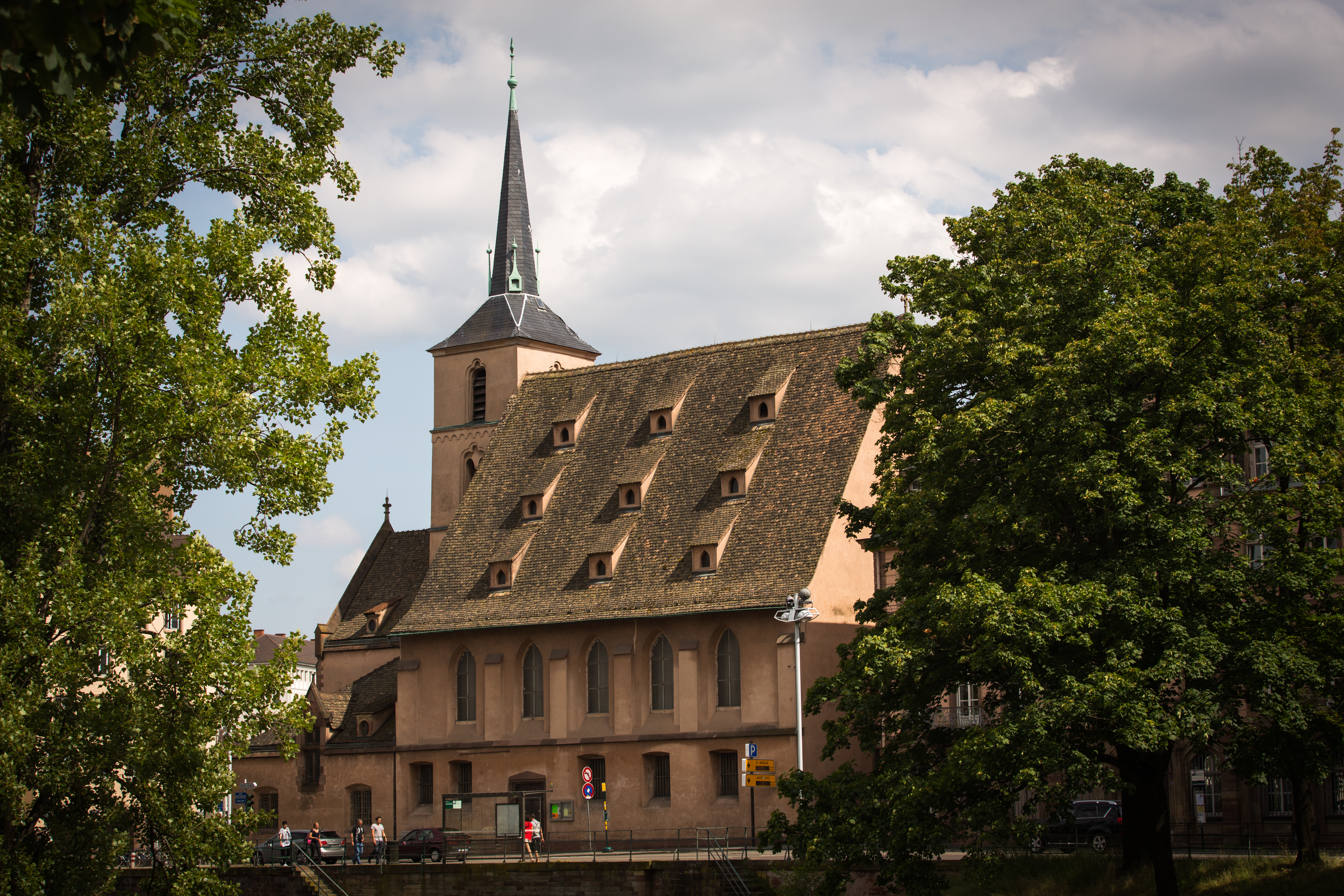 Strasbourg église Saint Nicolas juin 2013 .